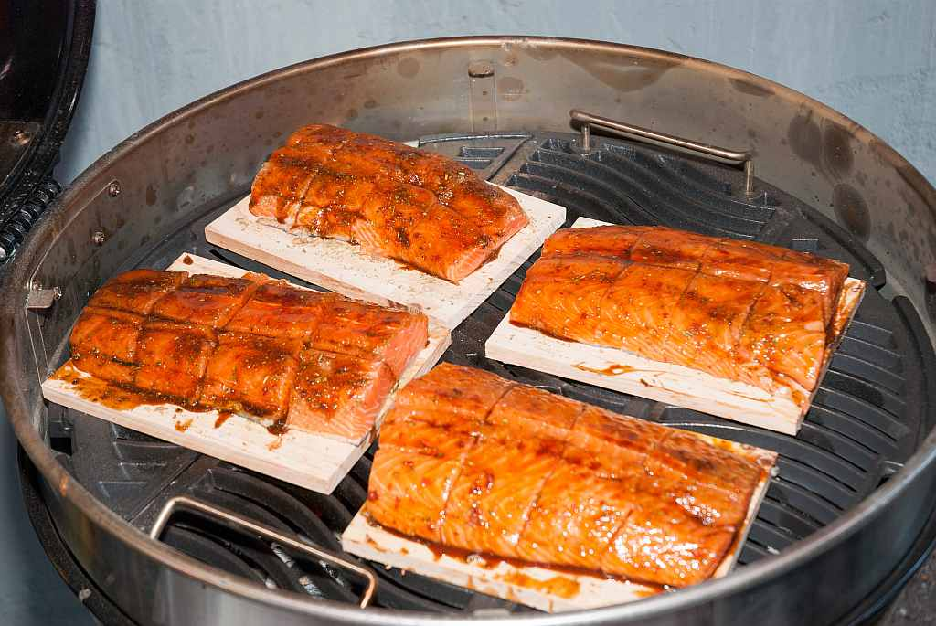 Lachs auf Zedernholz im Kugelgrill (Plankengrillen).